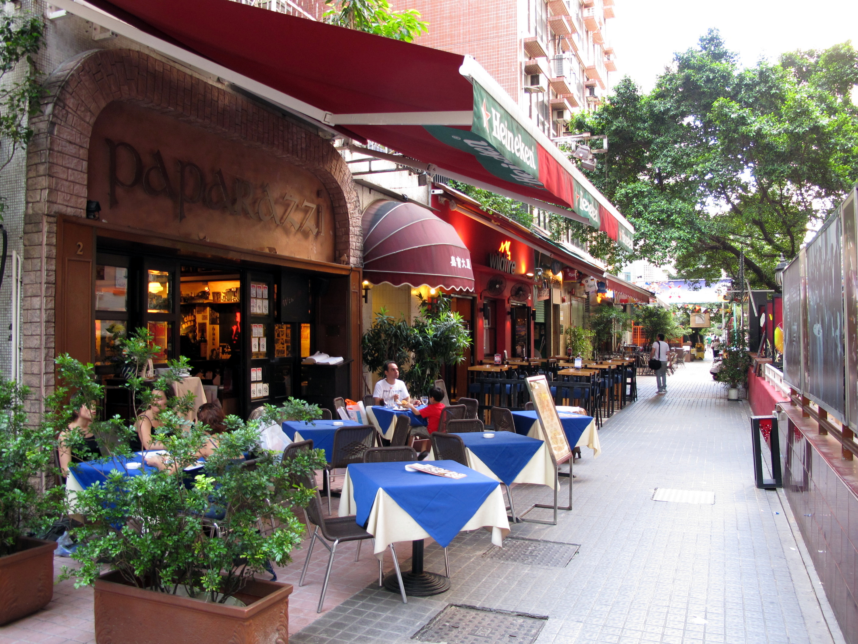 Knutsford Terrace